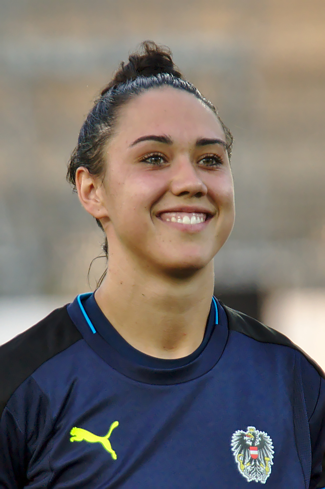 Freundschaftsspiel ÖFB Damen Nationalmannschaft gegen Dänemark am 6. Juli 2017. Bild zeigt: Manuela Zinsberger